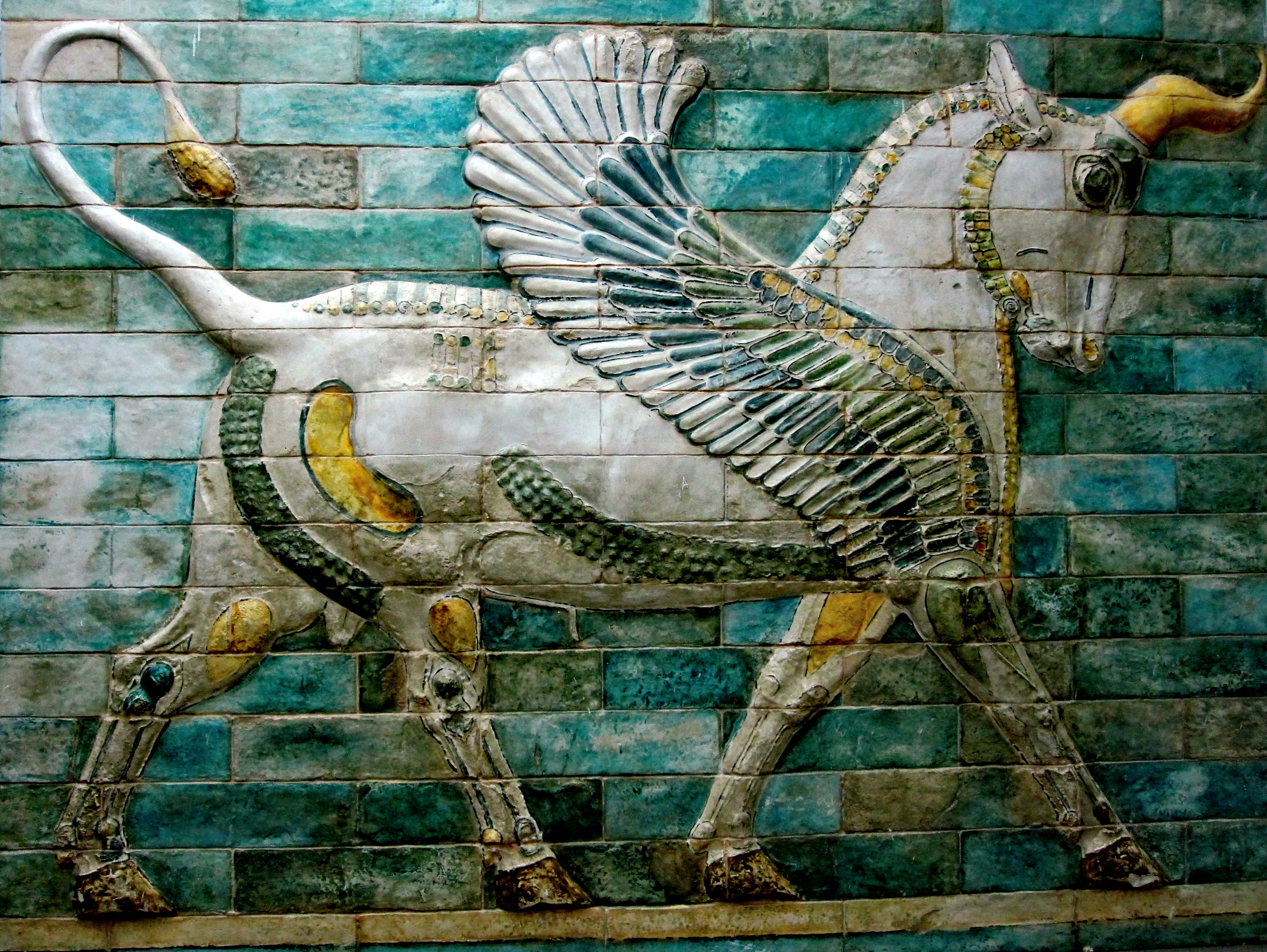 آپادانا